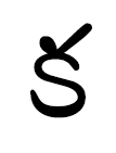 Какараму - буква телугу